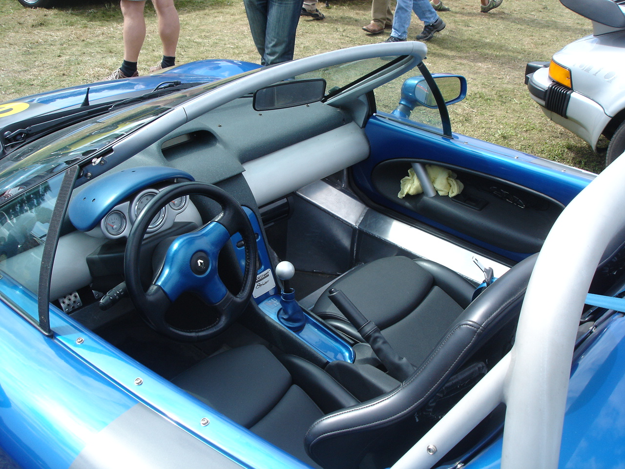 Innenraum eines Renault Spider